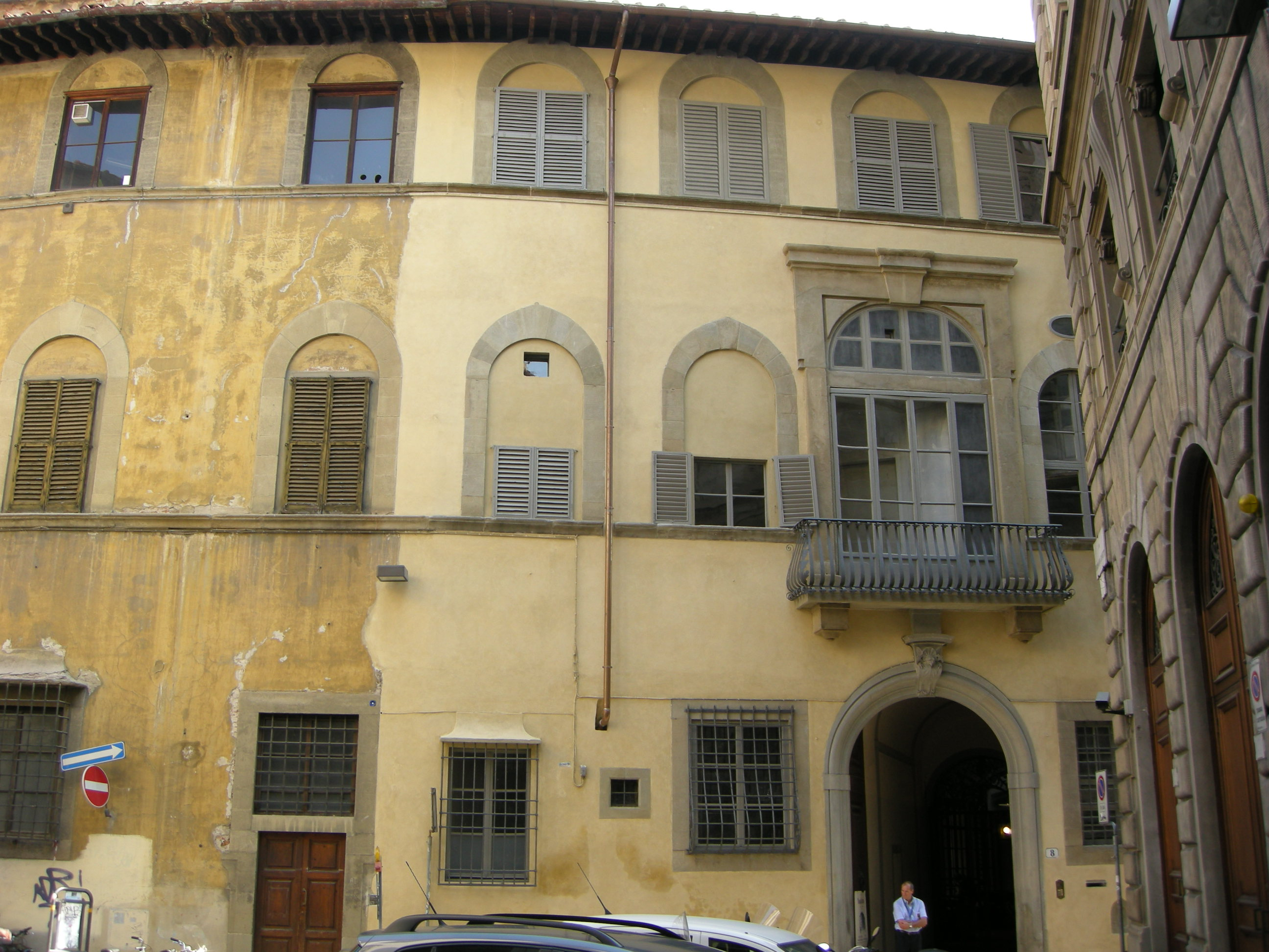 Casa martelli